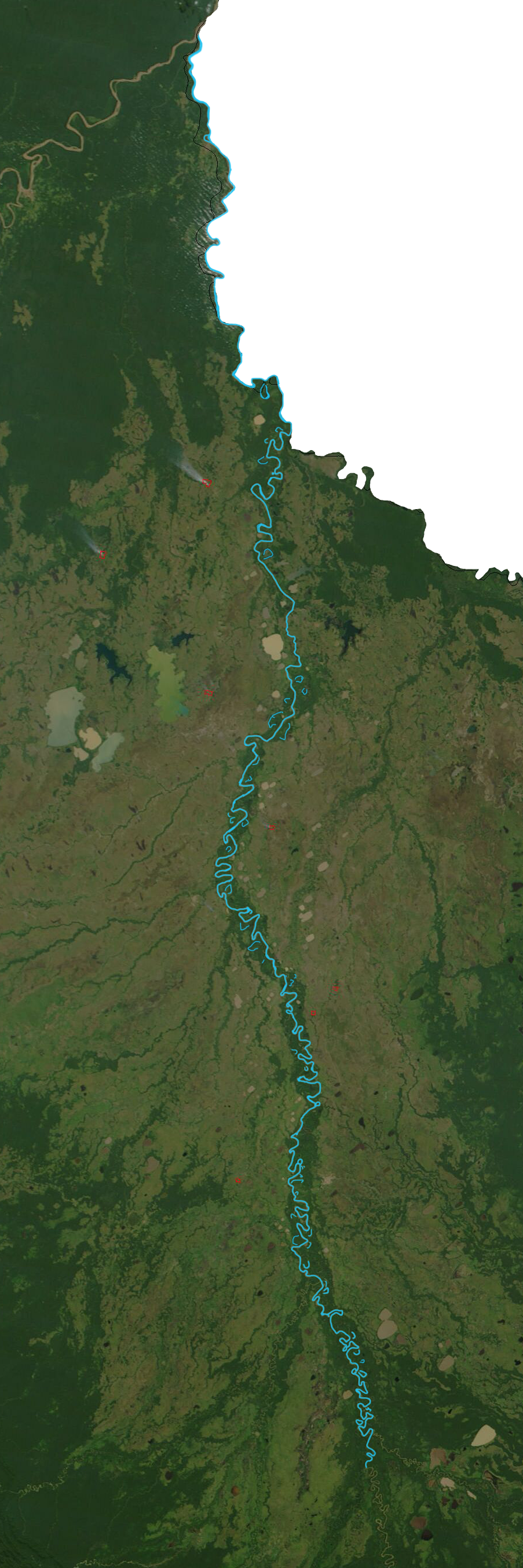 Vista del recorrido del río Mamoré el más importante de Bolivia, hecha a partir de una imagen de la NASA.